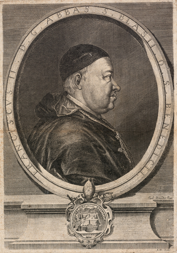 Franciscus II.D.G. Abbas S. Blasii. O.S. Benedicti (Franz II. Schächtelin, Abt von St. Blasien); Kupferstich, 34,2 x 23,7 cm Plattenrand. Im Wappen 1740 datiert. Onken Nr. C7.